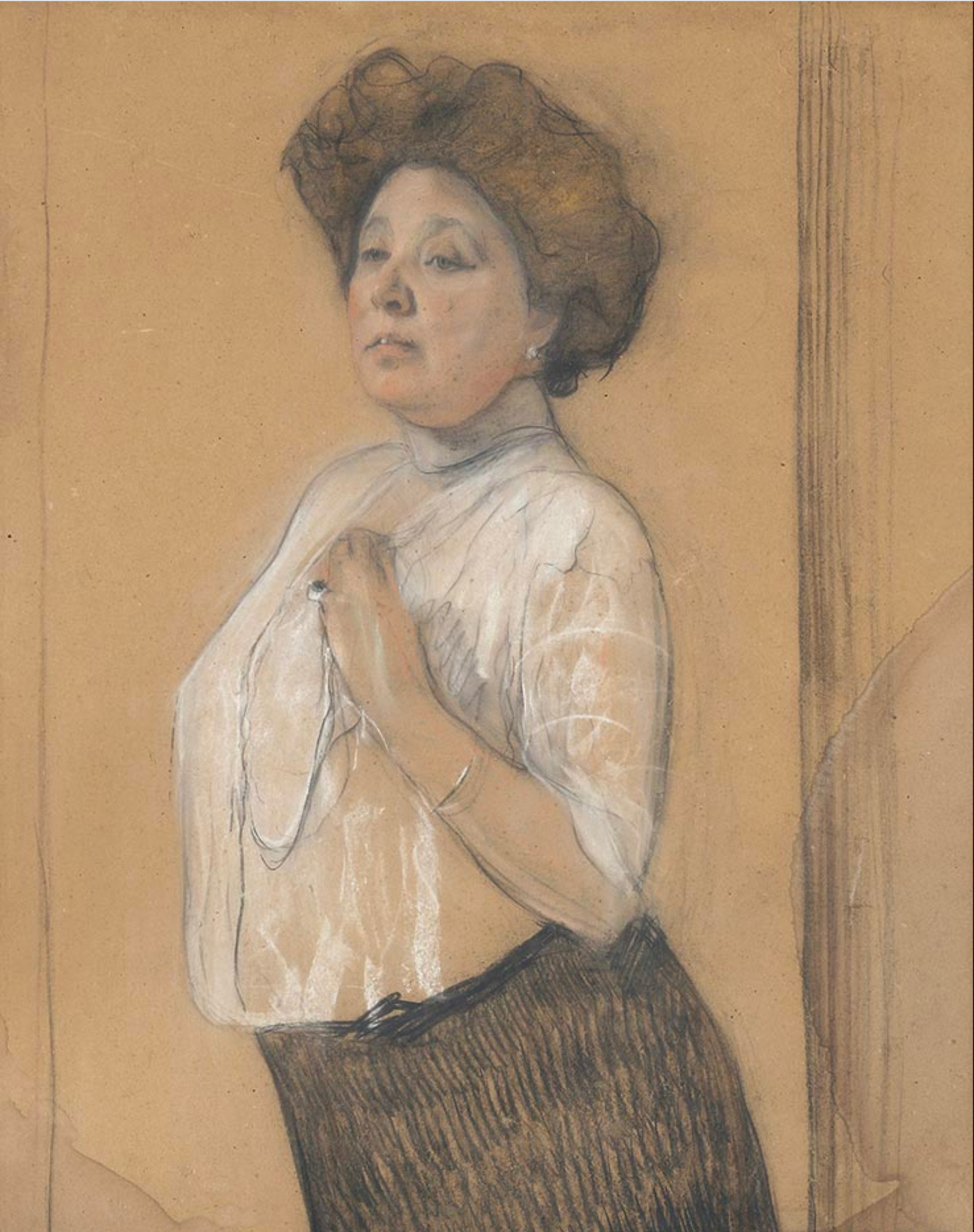 Портрет Надежды Петровны Ламановой